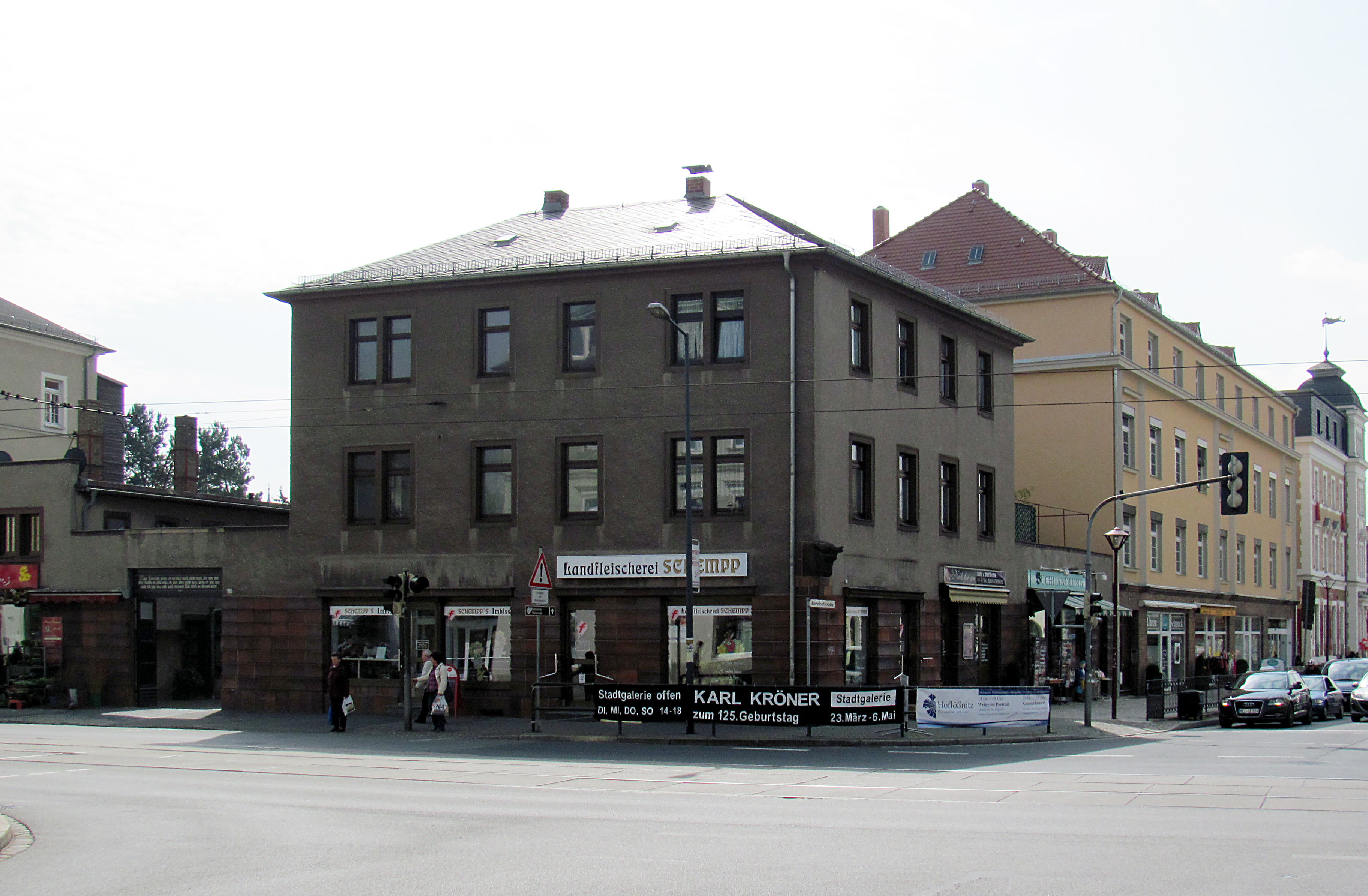 Radebeul, Wohn- und Geschäftshaus Meißner Straße 279, rechts daneben Wohn- und Geschäftshaus Bahnhofstraße 12 sowie Wohn- und Geschäftshaus Bahnhofstraße 12b